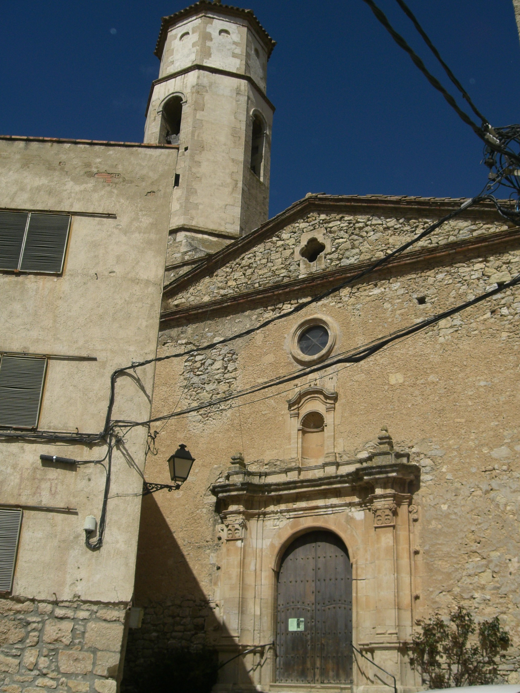 Foto Iglésia Sant Andreu2